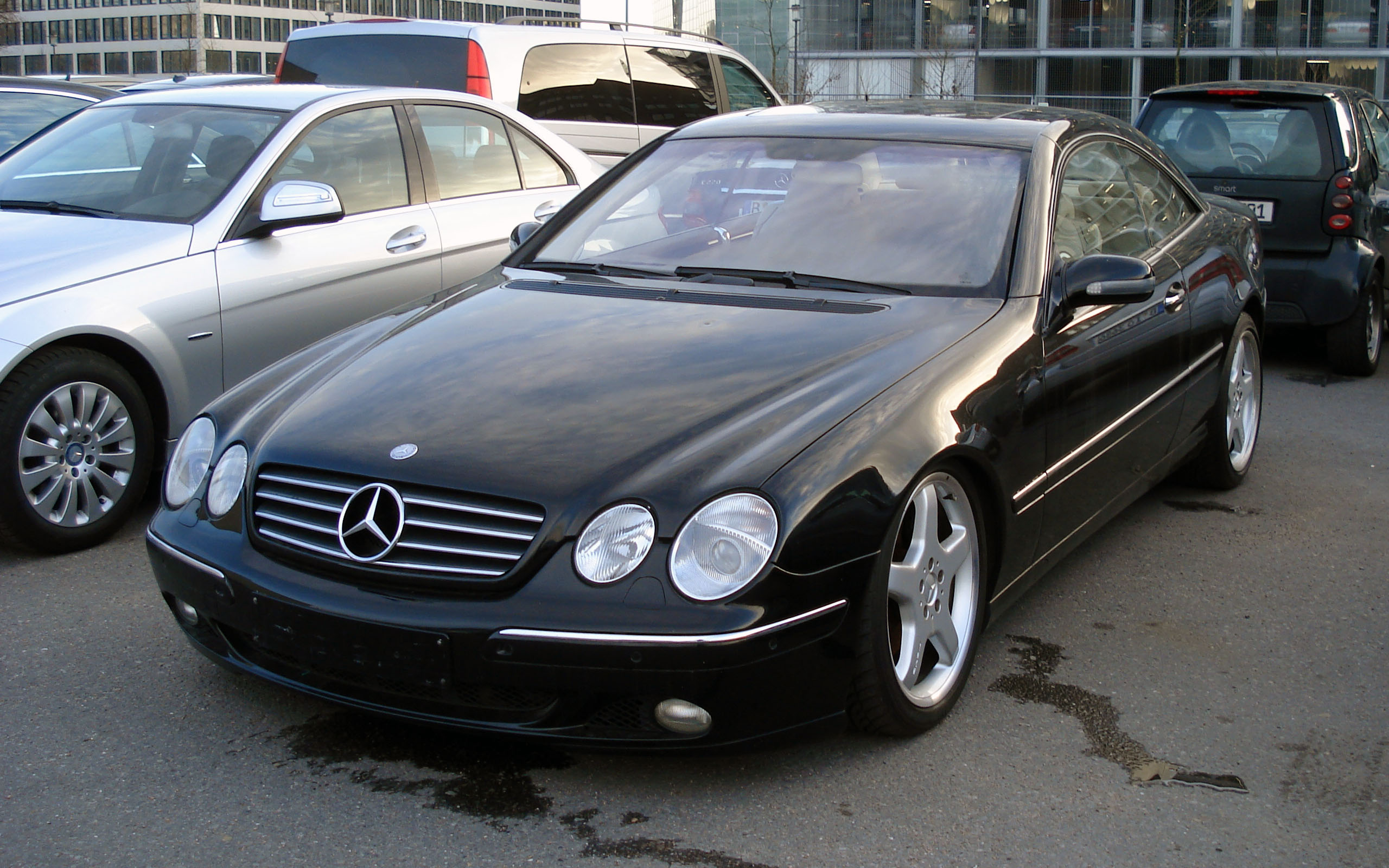 Mercedes CL